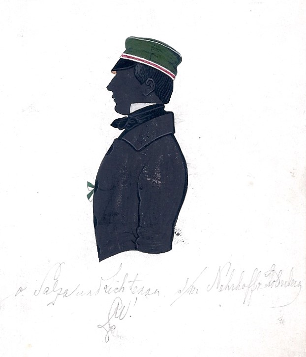 Schattenriss von Hermann von Salza und Lichtenau